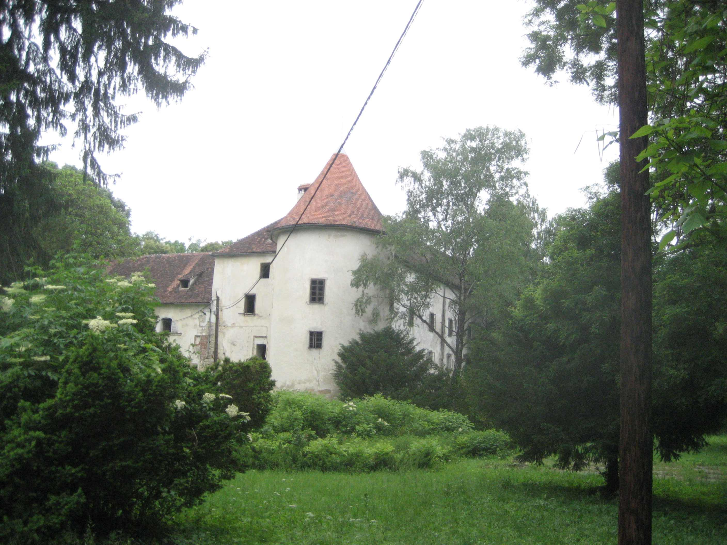 Castle Erdödy, Jastrebarsko, Croatia